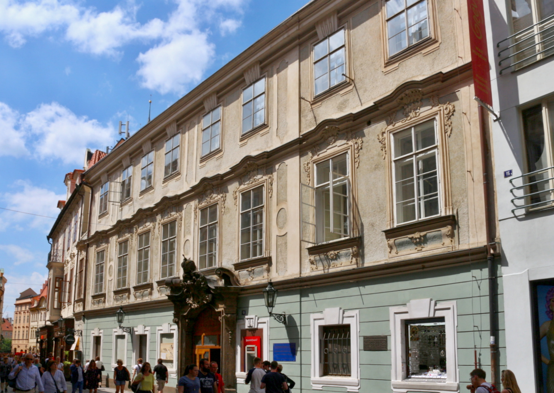 Millesimovský palác